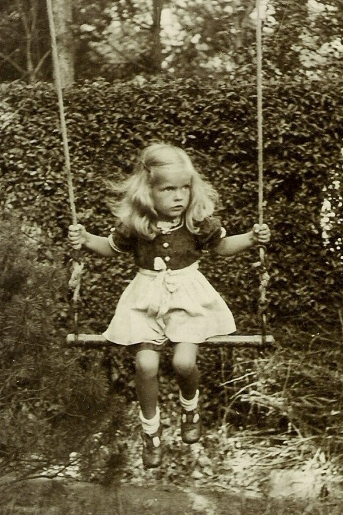 Kleines Mädchen auf Gartenschaukel